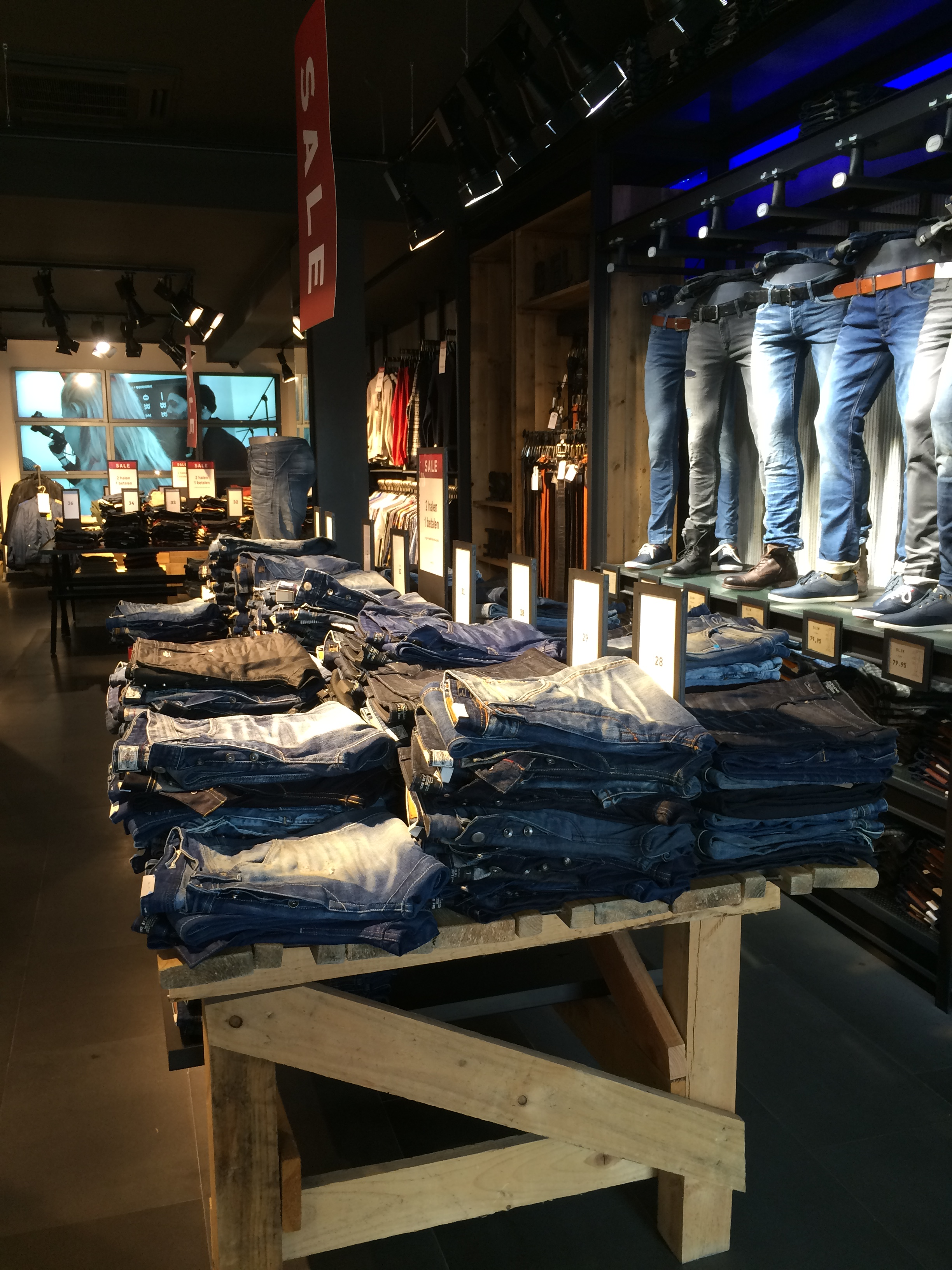 Jack & Jones Innen